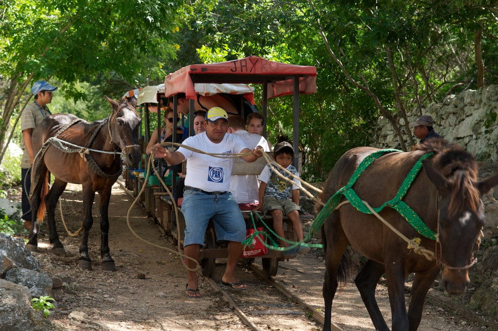 Transportación por decauville hacia los cenotes en Cuzamá Yucatán México